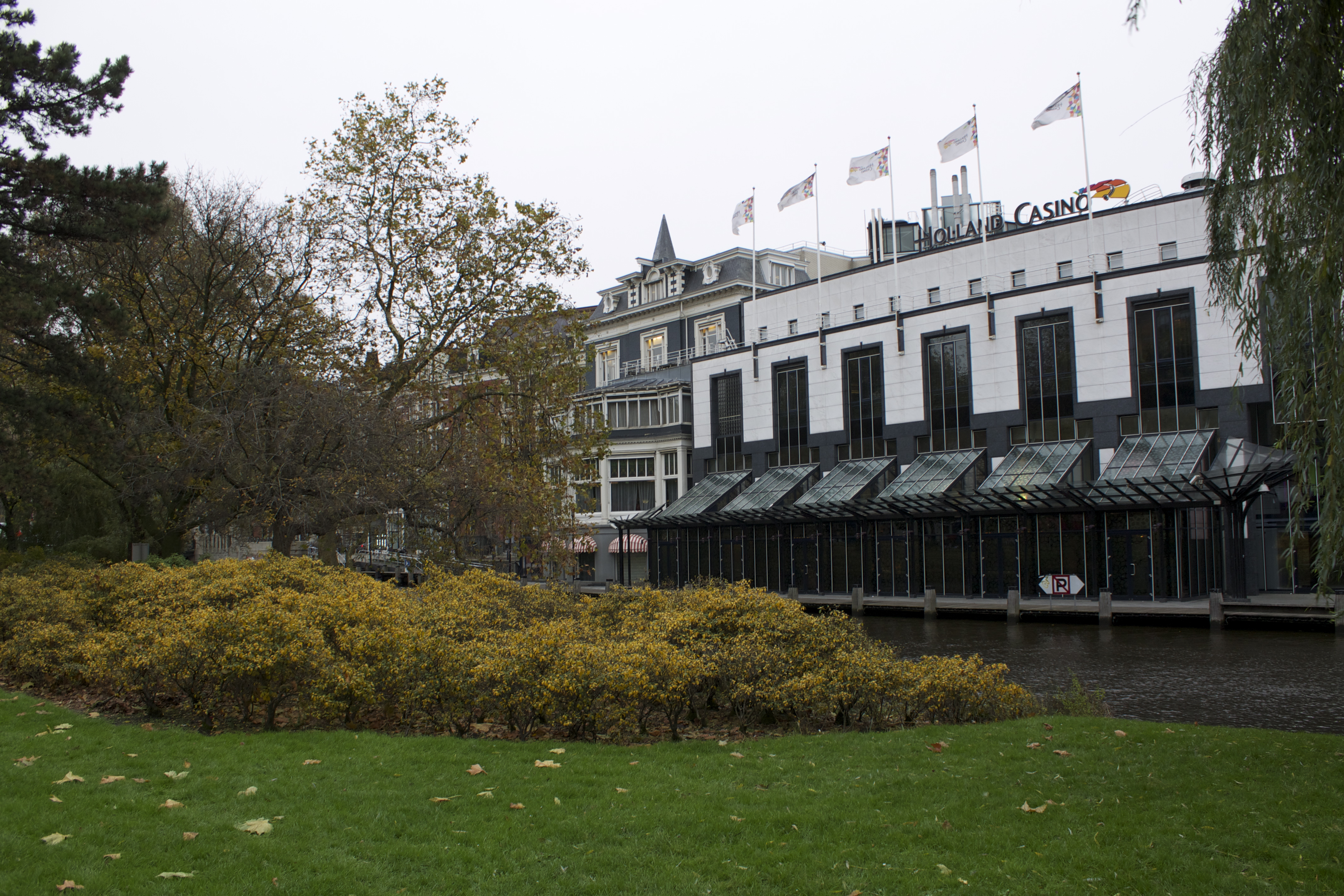 Amsterdam , Netherlands